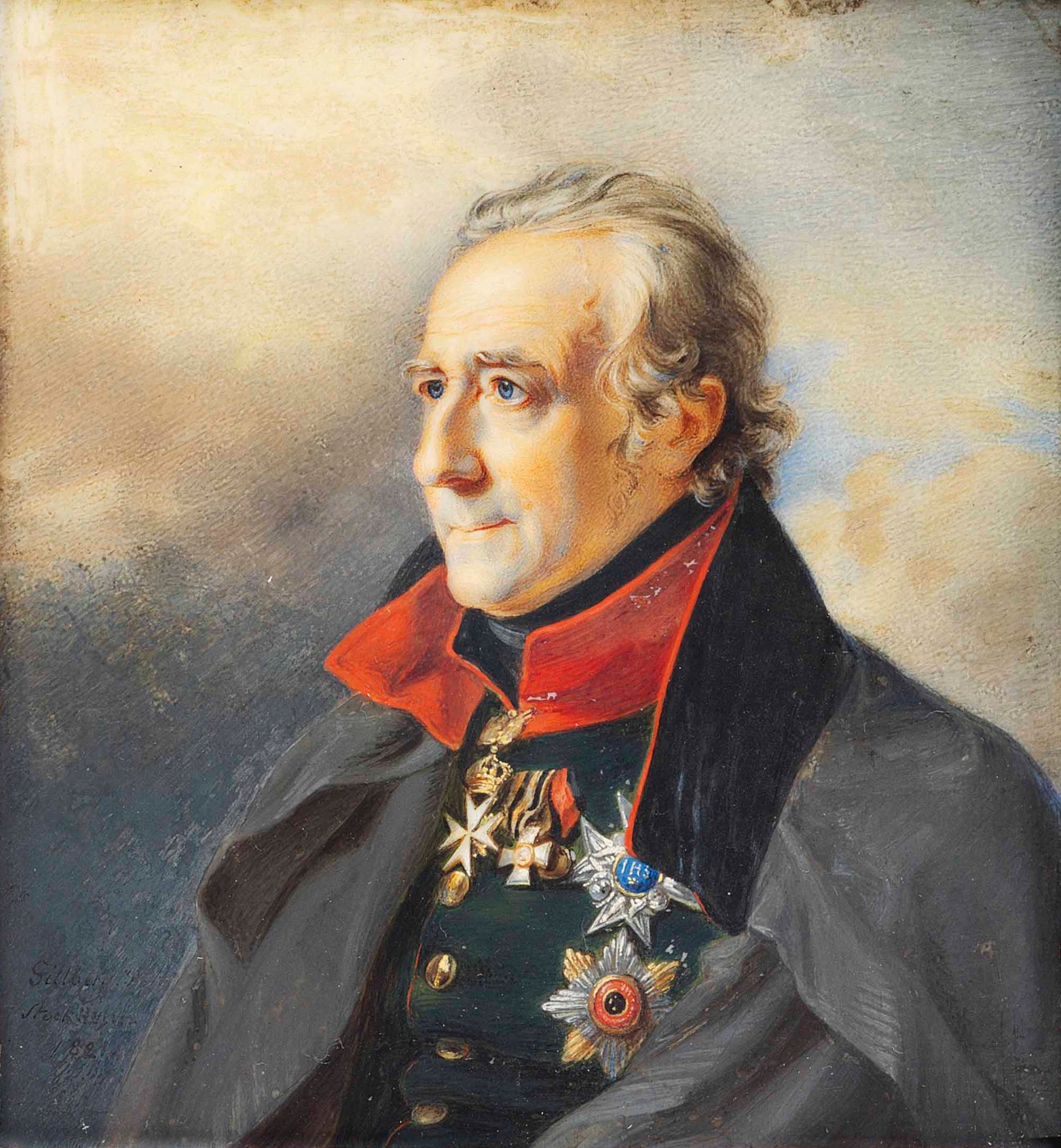 Jan Pieter van Suchtelen avporträtterad iklädd uniform. På bröstet bär han kraschan för Serafimerorden samt den ryska Sankt Georgsorden. Målning av Jacob Axel Gillberg (1769-1845). Signerad: "Gillberg. p. Stockholm 1821"